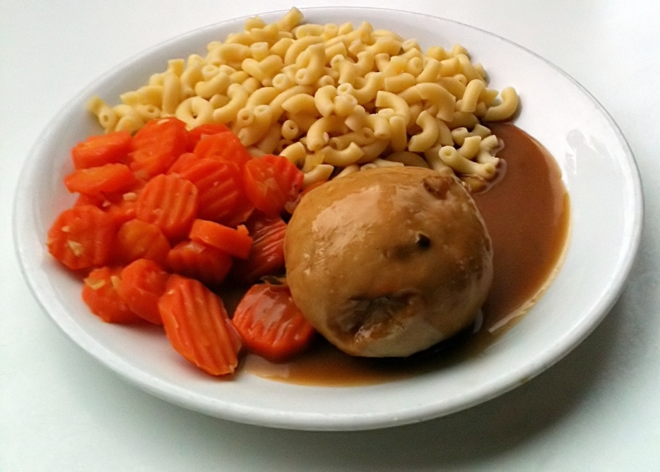 Teller mit Adrio, Hörnli und Rüebli